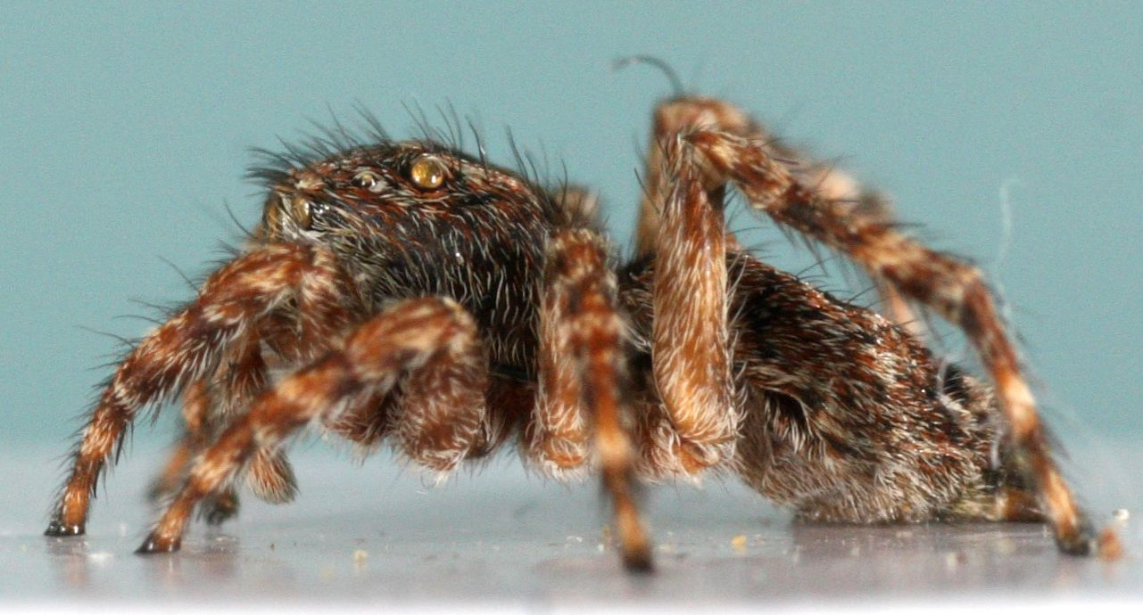 Hunn av hoppeedderkopp Sitticus floricola eller S. distinguendus, jeg er ikke sikker på arten